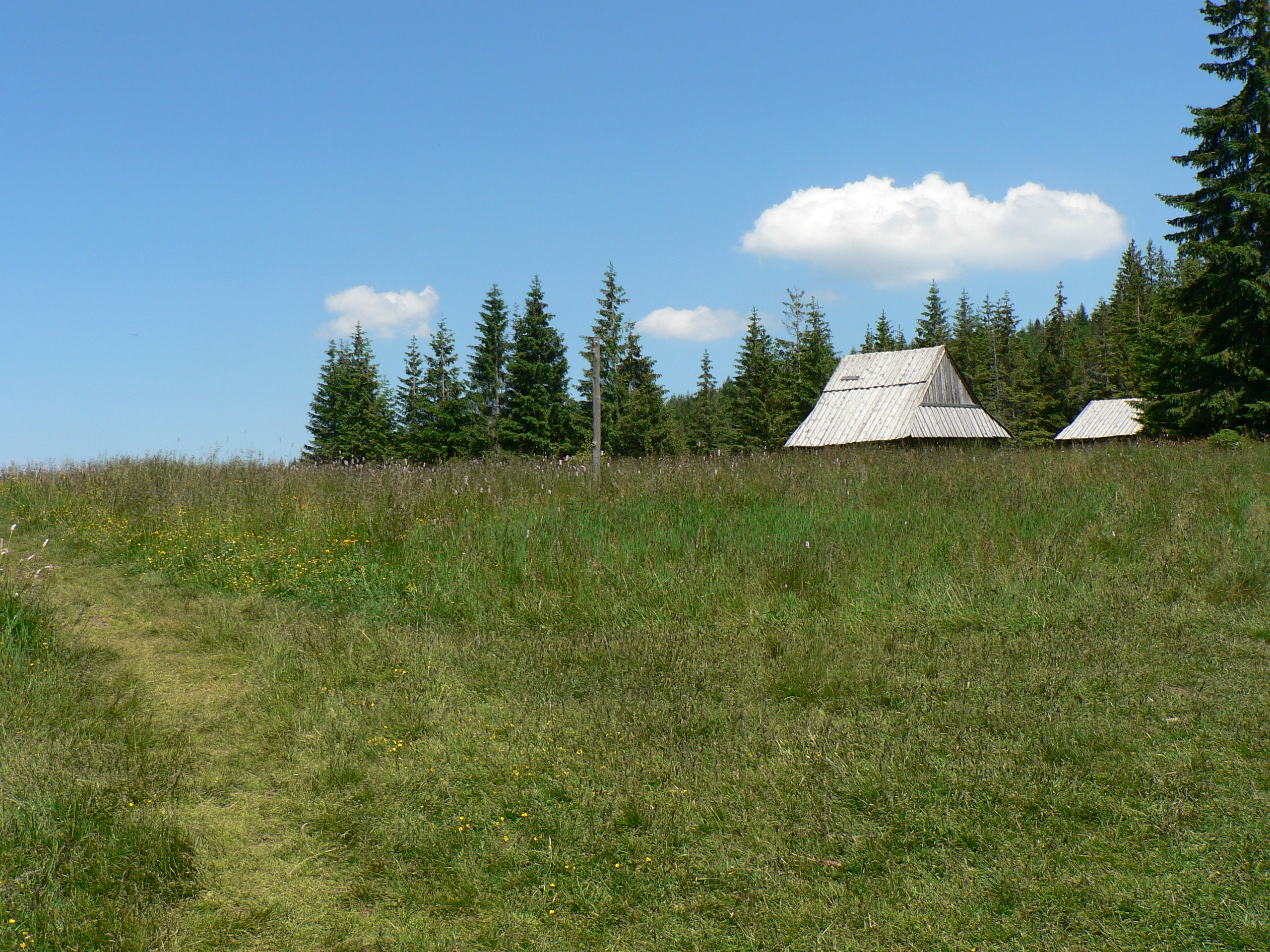 Polana Kopieniec, południowy skraj